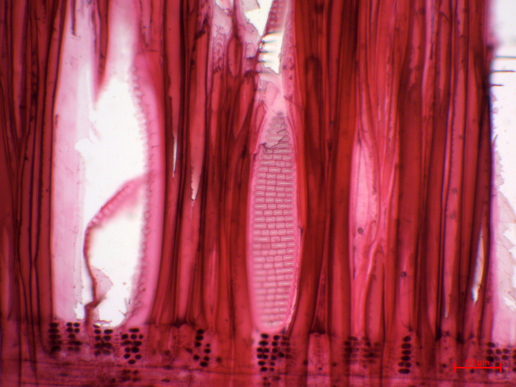 LiriodendronXylem_20x_2